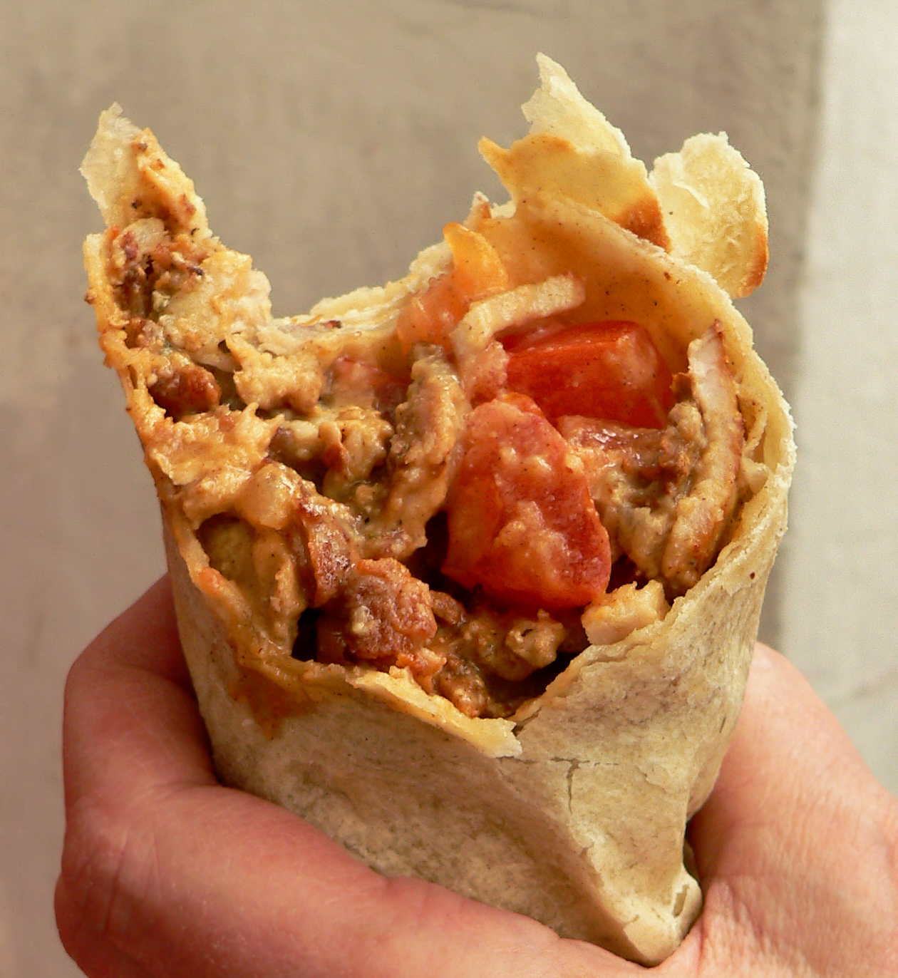 Teilverzehrter Rollo, Typ „Arabic“. Hier von einem Rollo-Imbiss in Bremen.